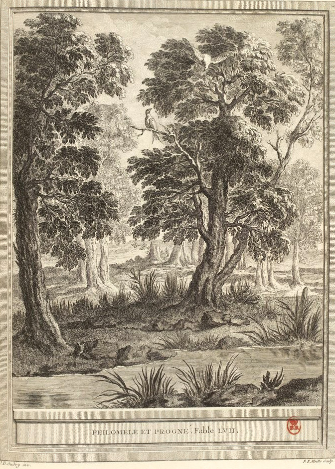 Gravure réalisée par Pierre Etienne Moitte d'après un dessin de Jean-Baptiste Oudry représentant la fable Philomèle et Progné de Jean de La Fontaine (fable 15 du livre III). Cette gravure est parue dans l'édition complète des fables de La Fontaine, parue en quatre tomes chez l'éditeur Desaint & Saillant, rue saint Jean de Beauvais à Paris, 1755-1759.